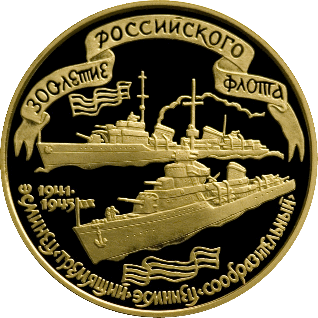 Монета Банка России — Серия: «Флот», 300-летие Российского флота, 100 рублей — Эсминцы «Гремящий» и «Сообразительный», реверс